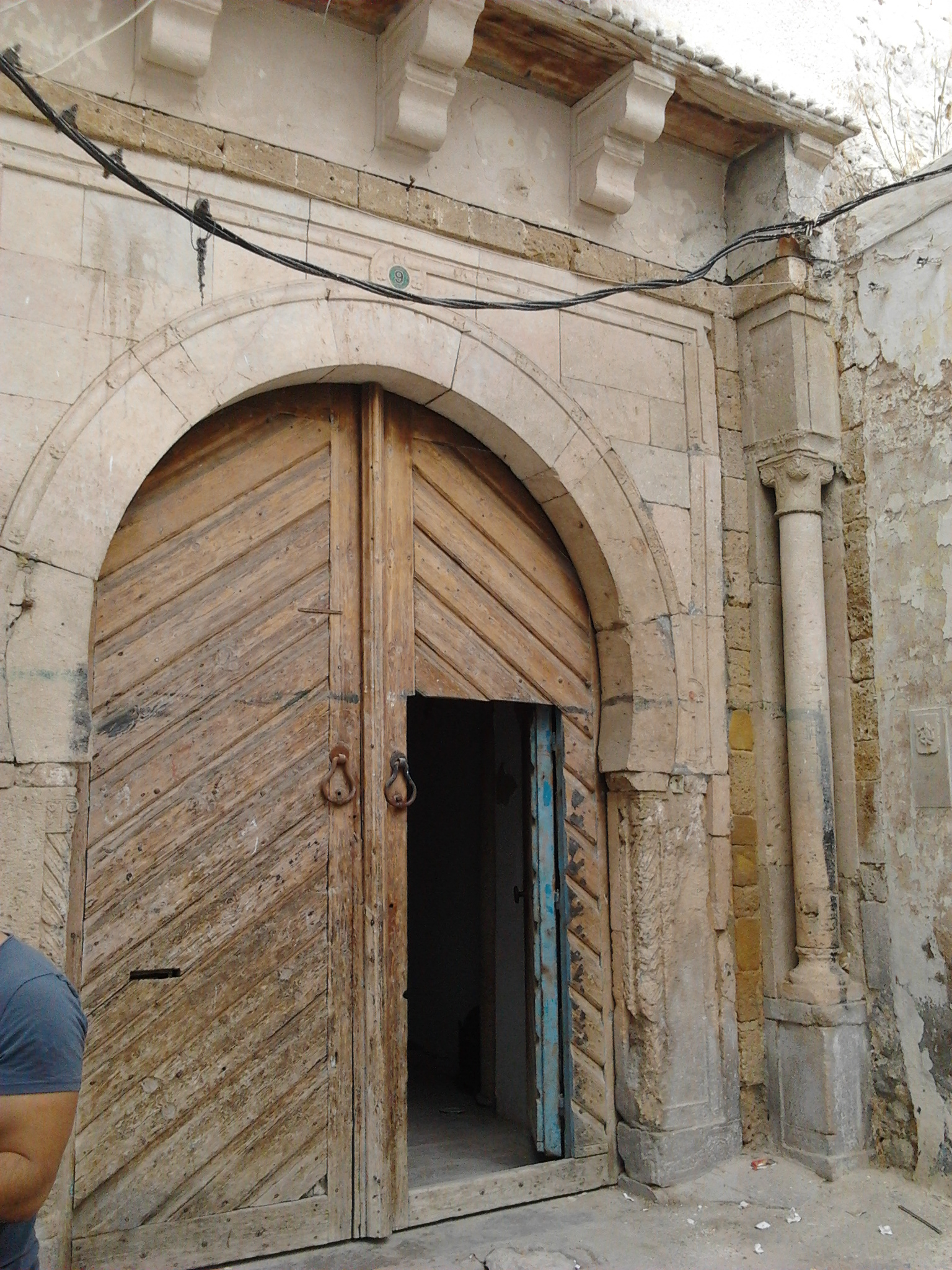 La maison sicilienne - Medina - Tunis / Dar Bach Hamba